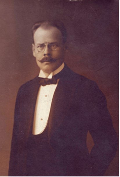 Філарэт (Раменскі)